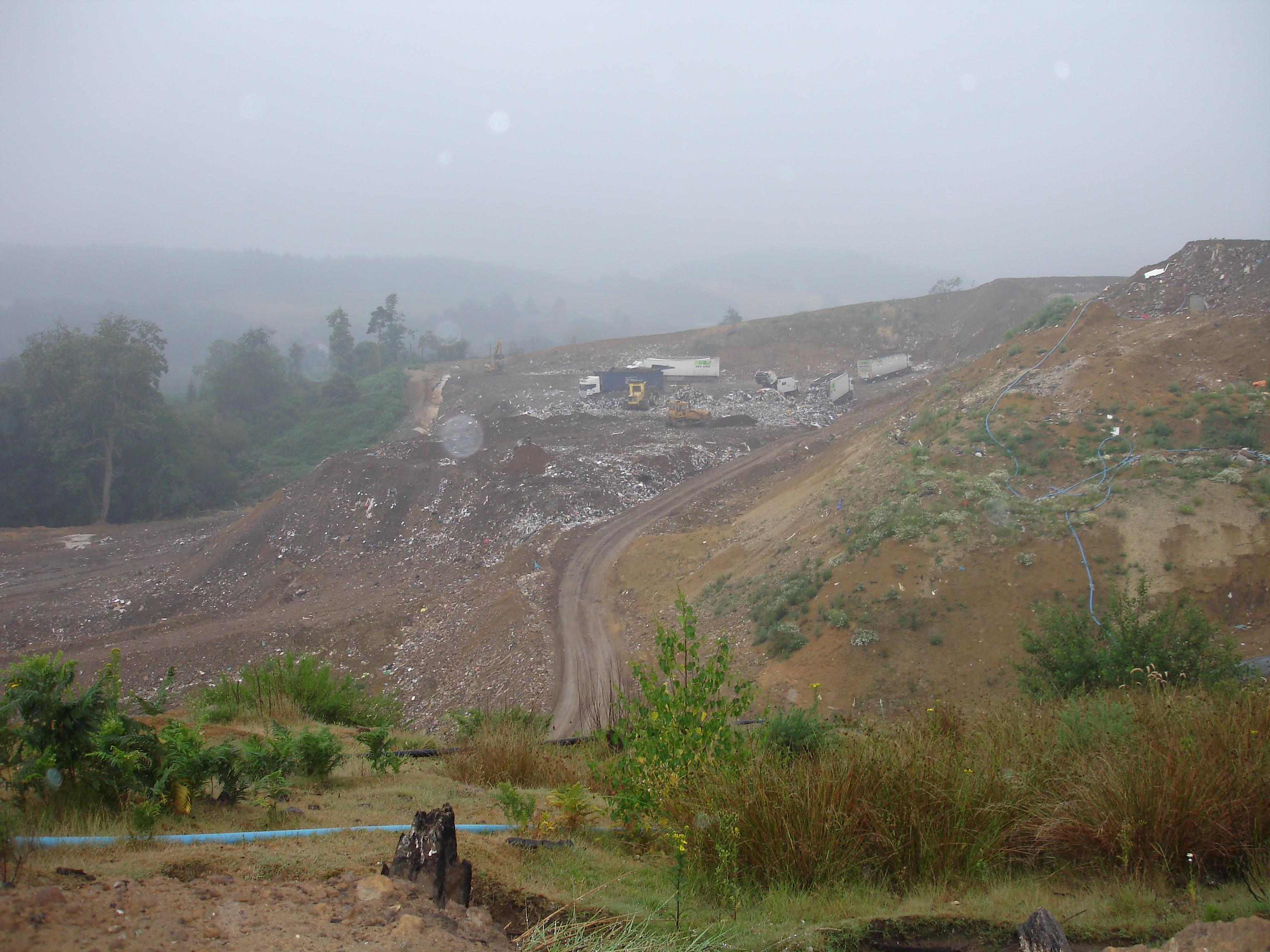 Relleno Sanitario en Albury, Surrey, Inglaterra.